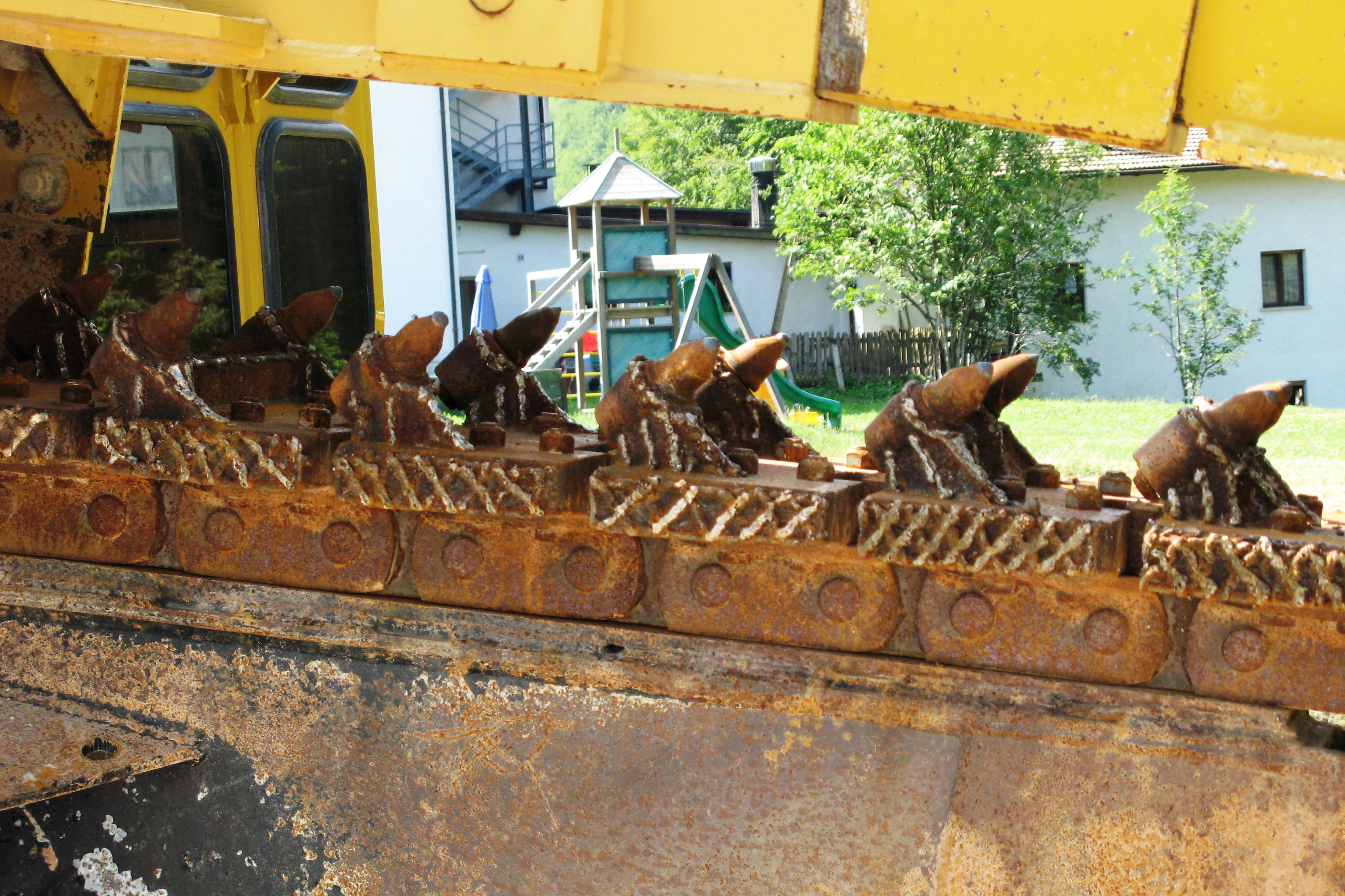 Grueffräs. Detail vun der Kette mat de Fräszänn. Kategorie:Baumaschinnen